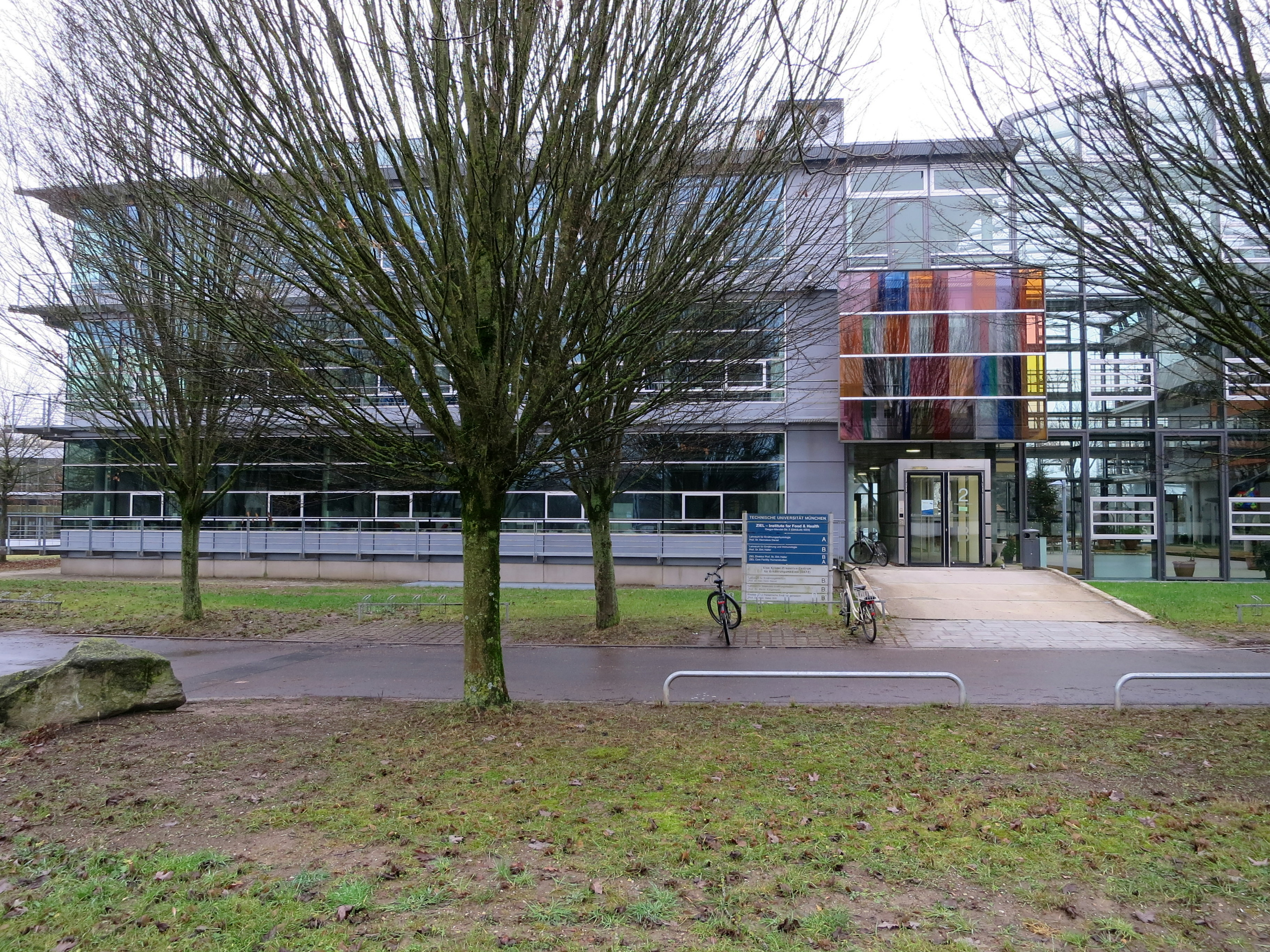 ZIEL - Zentralinstitut, Institute for Food & Health